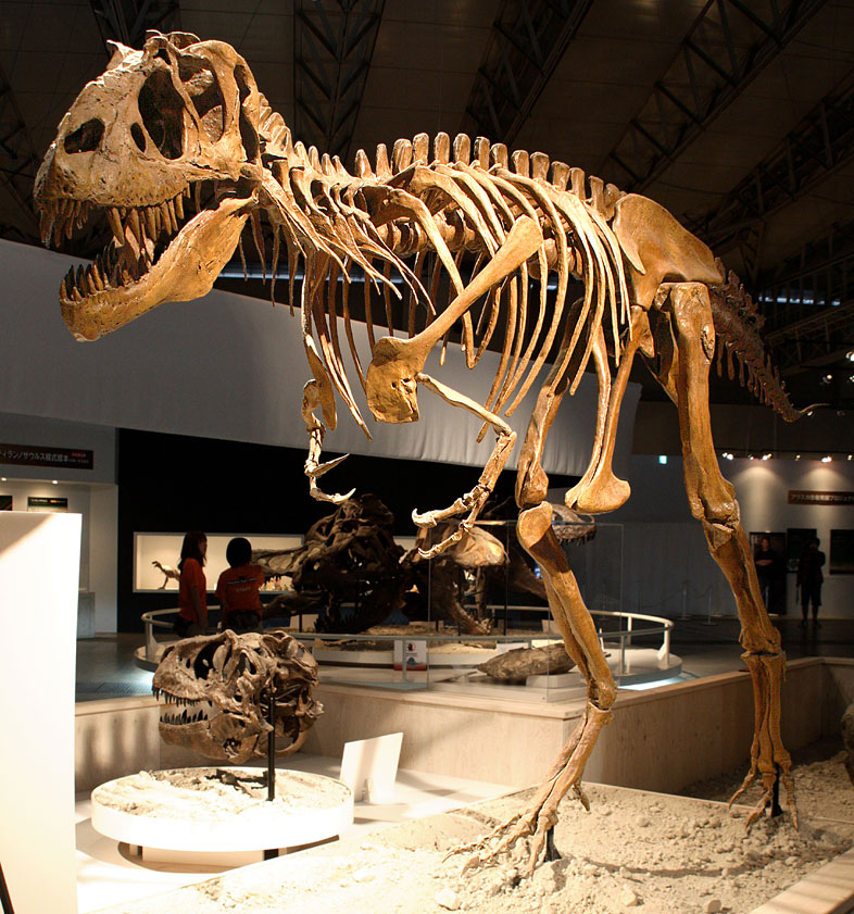 Gorgosaurus - 01